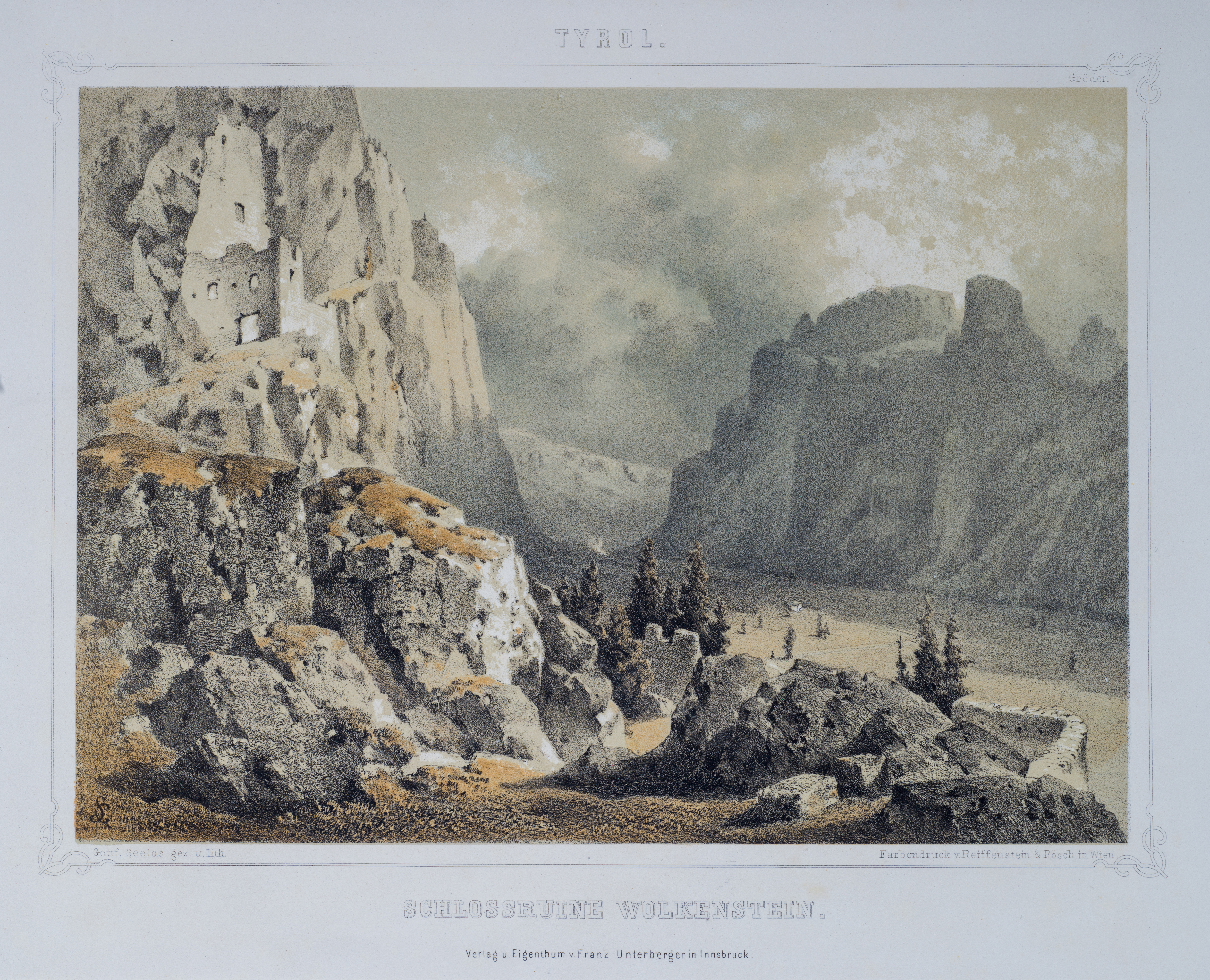 Verlag u. Eigentum v. Franz Unterberger in Innsbruck.Gottf. Seelos gez. u. lith. - Farbendruck v. Reiffenstein & Roesch in Wien.